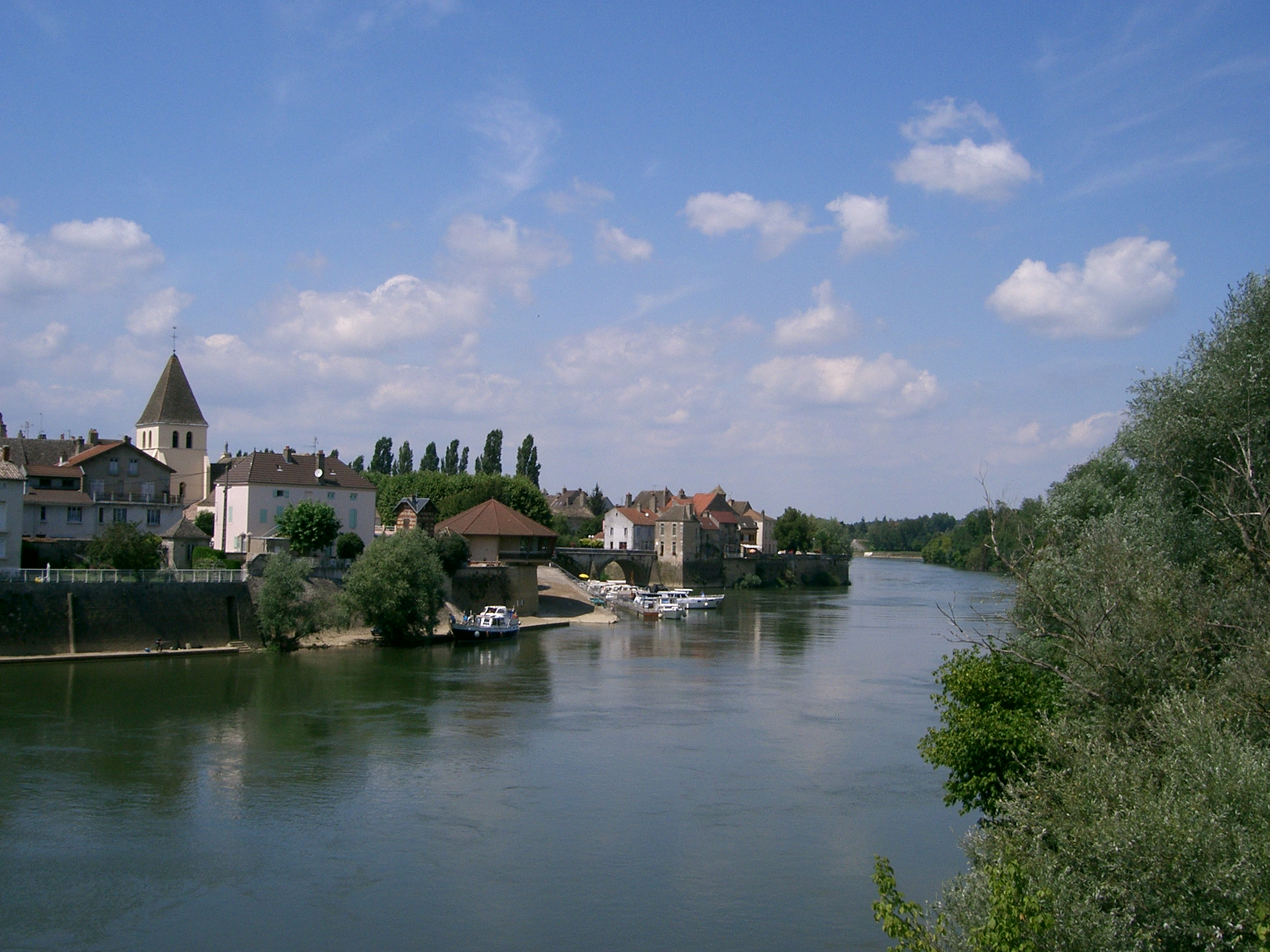 Verdun-sur-le-Doubs -(Saône et Loire - France) - centre du bourg sur les berges du Doubs